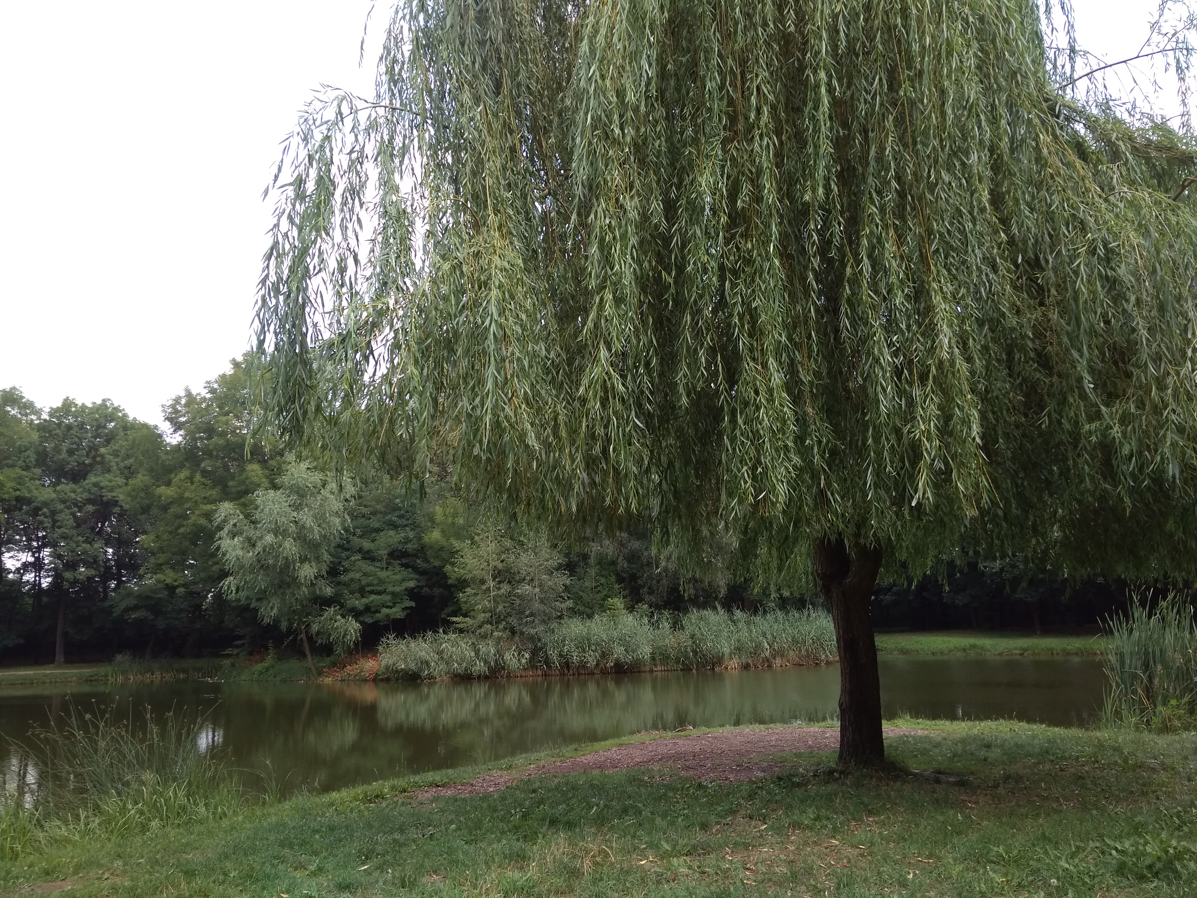 Staw w Parku Górnik w Siemianowicach Śląskich